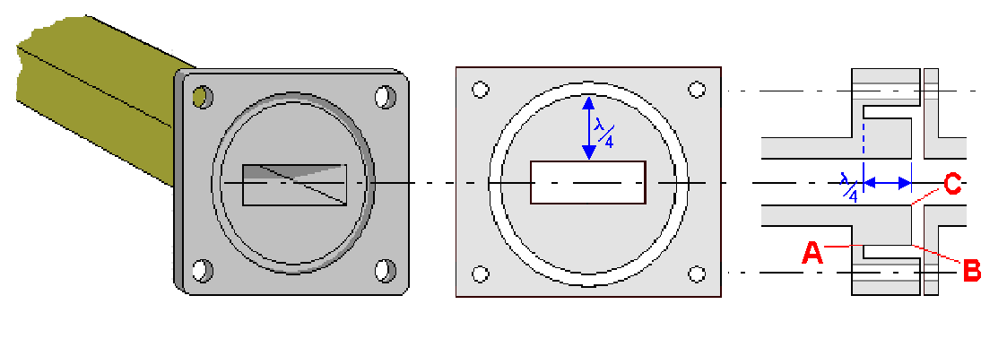 Flansch Lambda/4 λ/4